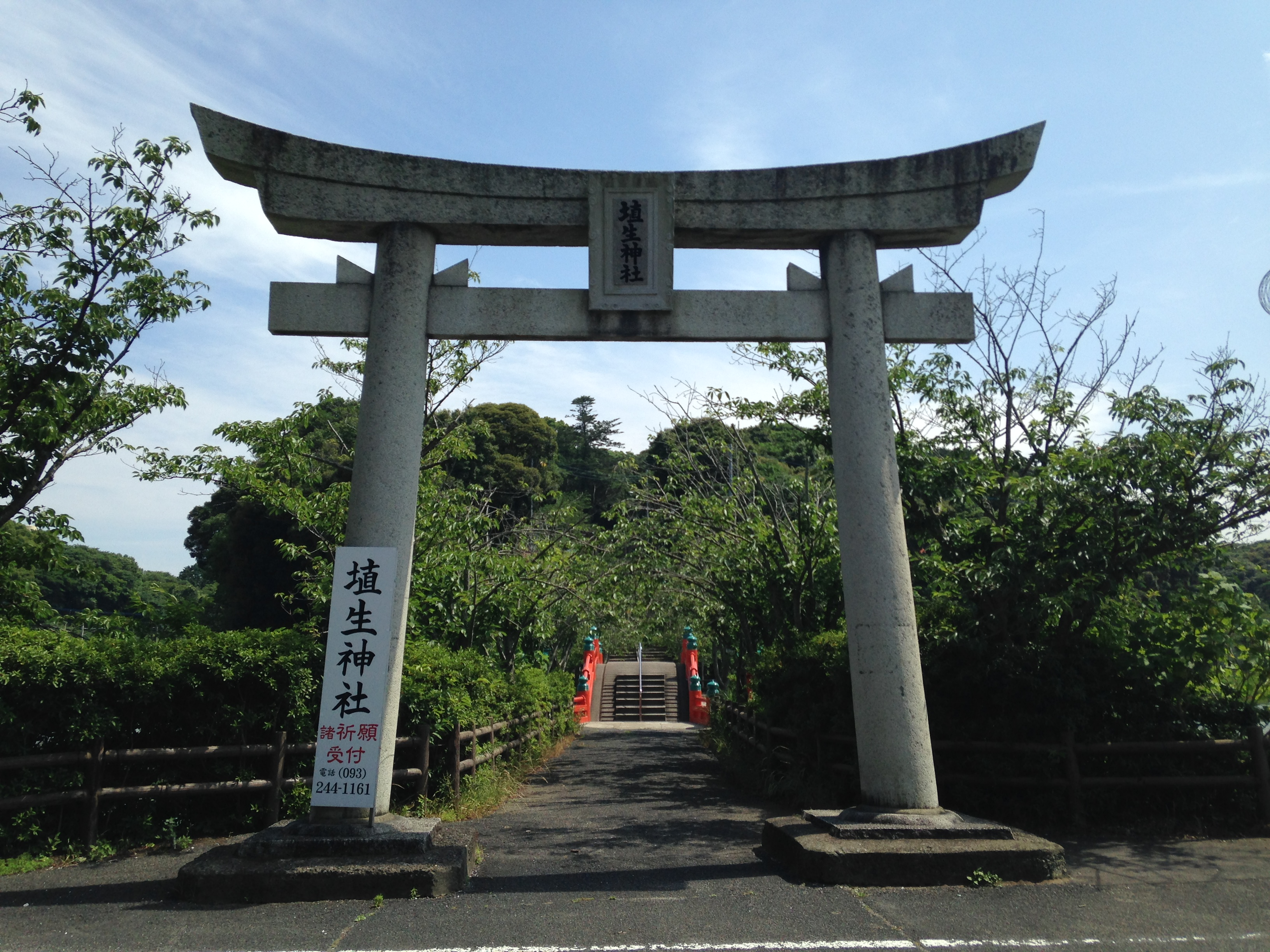 埴生神社の鳥居